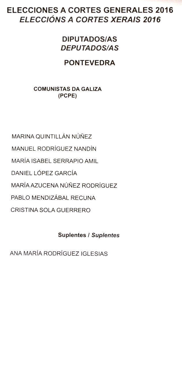 Papeletas electorales de las Elecciones a Cortes Generales de España de 2016, Provincia de Pontevedra.